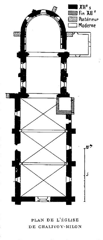 Plan de l'église Saint-Éloi de Chalivoy-Milon, d'après Deshoulières, Congrès Archéologique de Bourges, 1931, avec correction